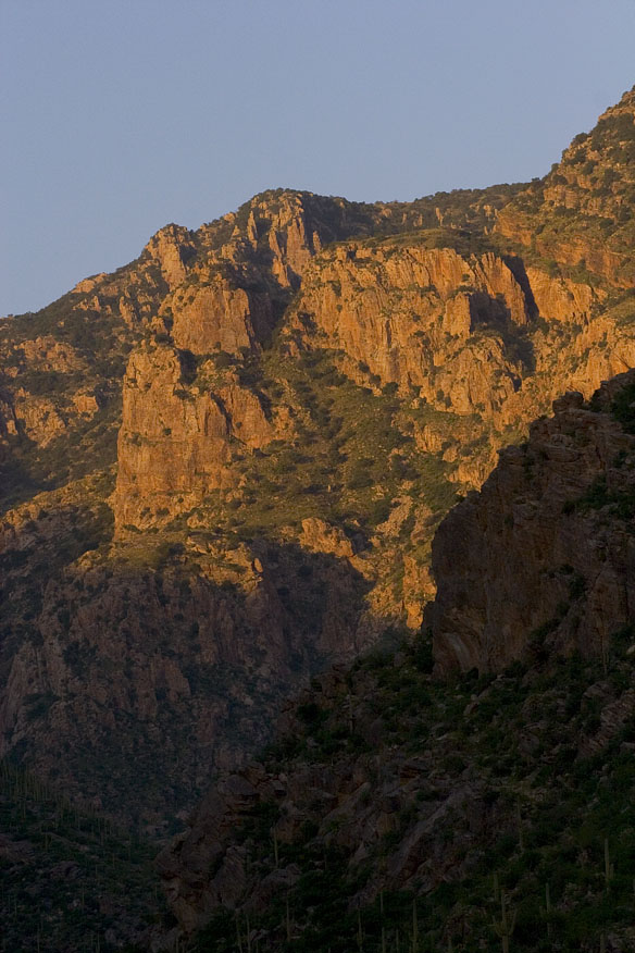 Pima Canyon at sunset